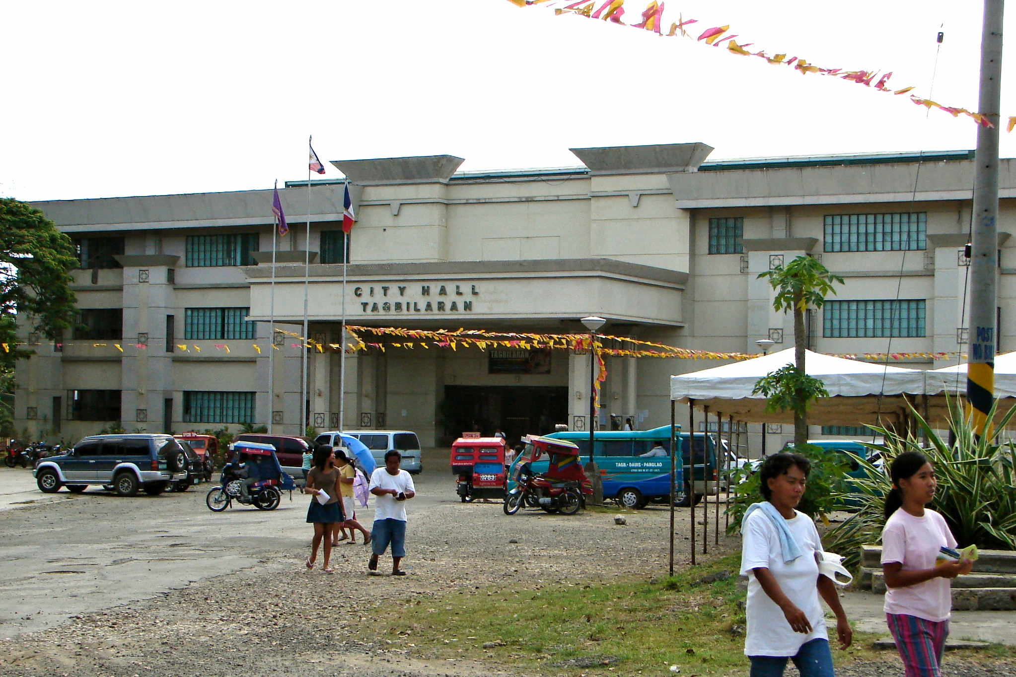 City hall of Tagbilaran, Bohol, Philippines